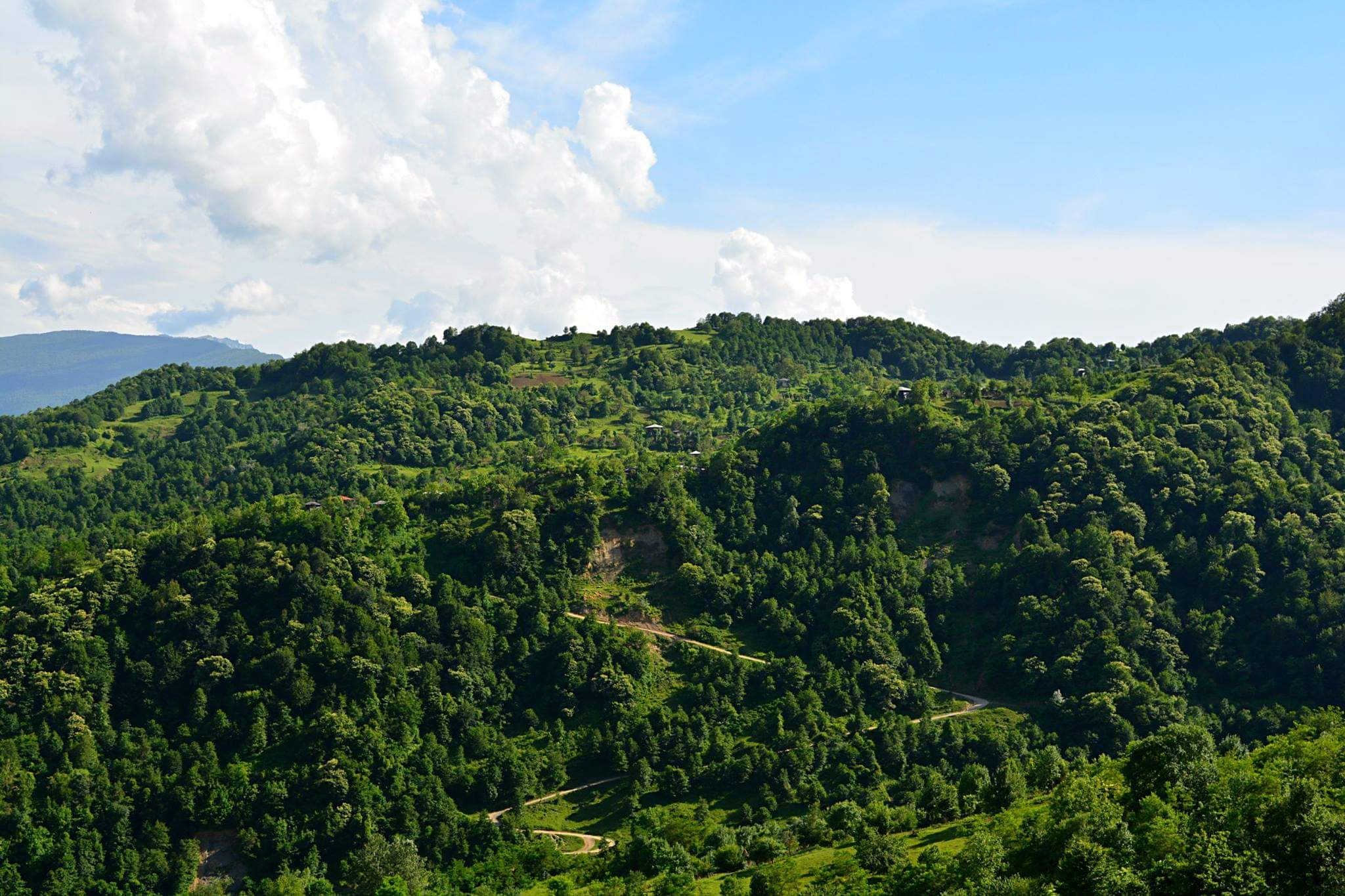 სოფელი ზარაგულა ზემო ლუხვანოს გზიდან. ფოტოსურათს ავტორი: თამარ ლეთოდიანი.